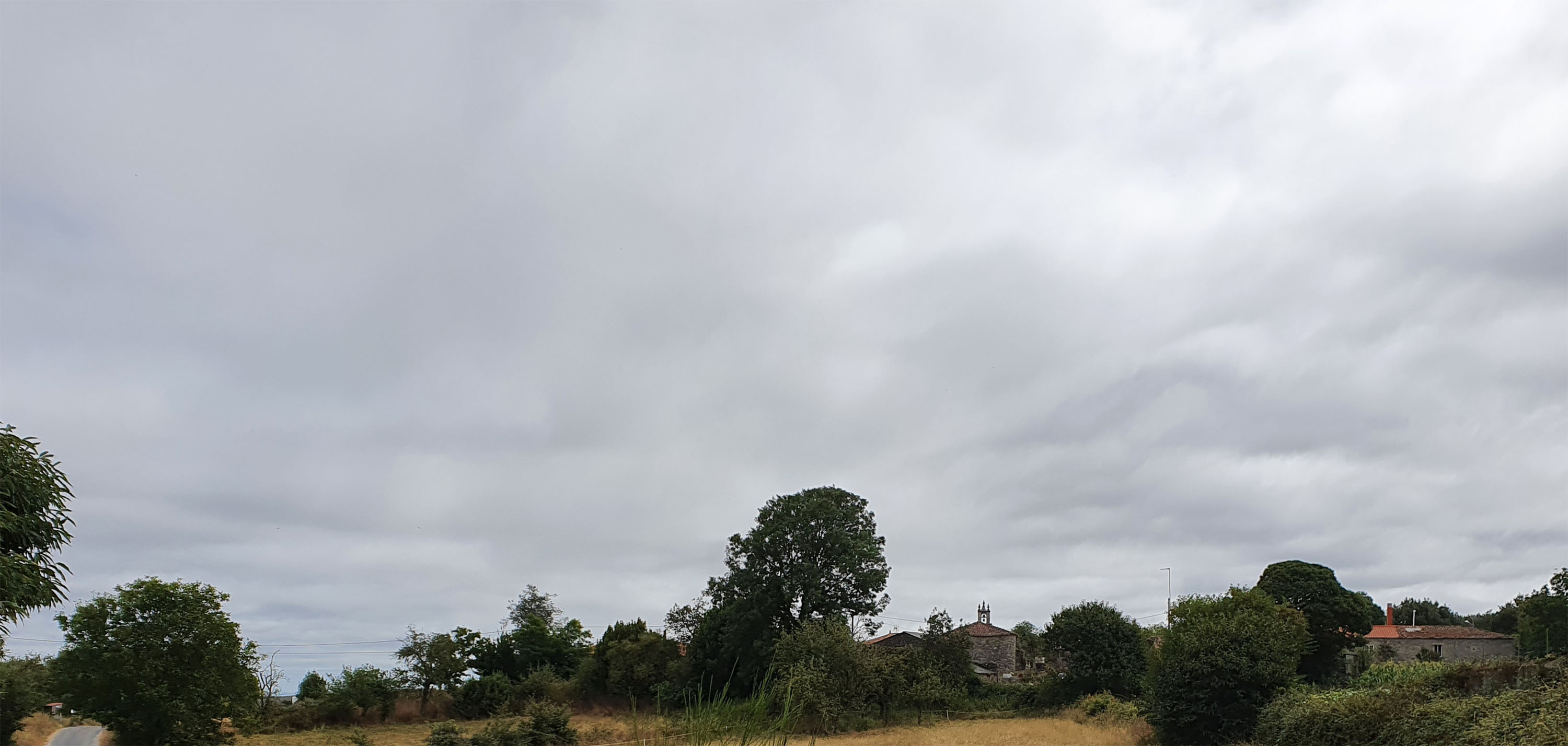 Lugar do Cibreiro, único enclave poboado da parroquia do mesmo nome. Pertence ao Concello de Antas de Ulla (Lugo), e linda ao sur co Concello pontevedrés de Rodeiro.